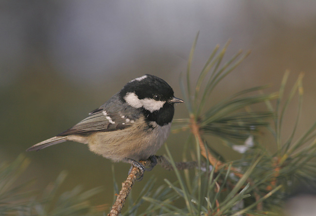 Periparus ater